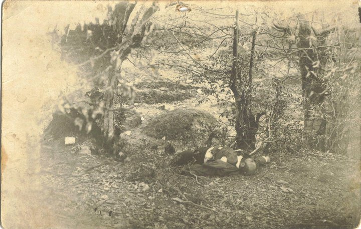 Яне Сандански убит.